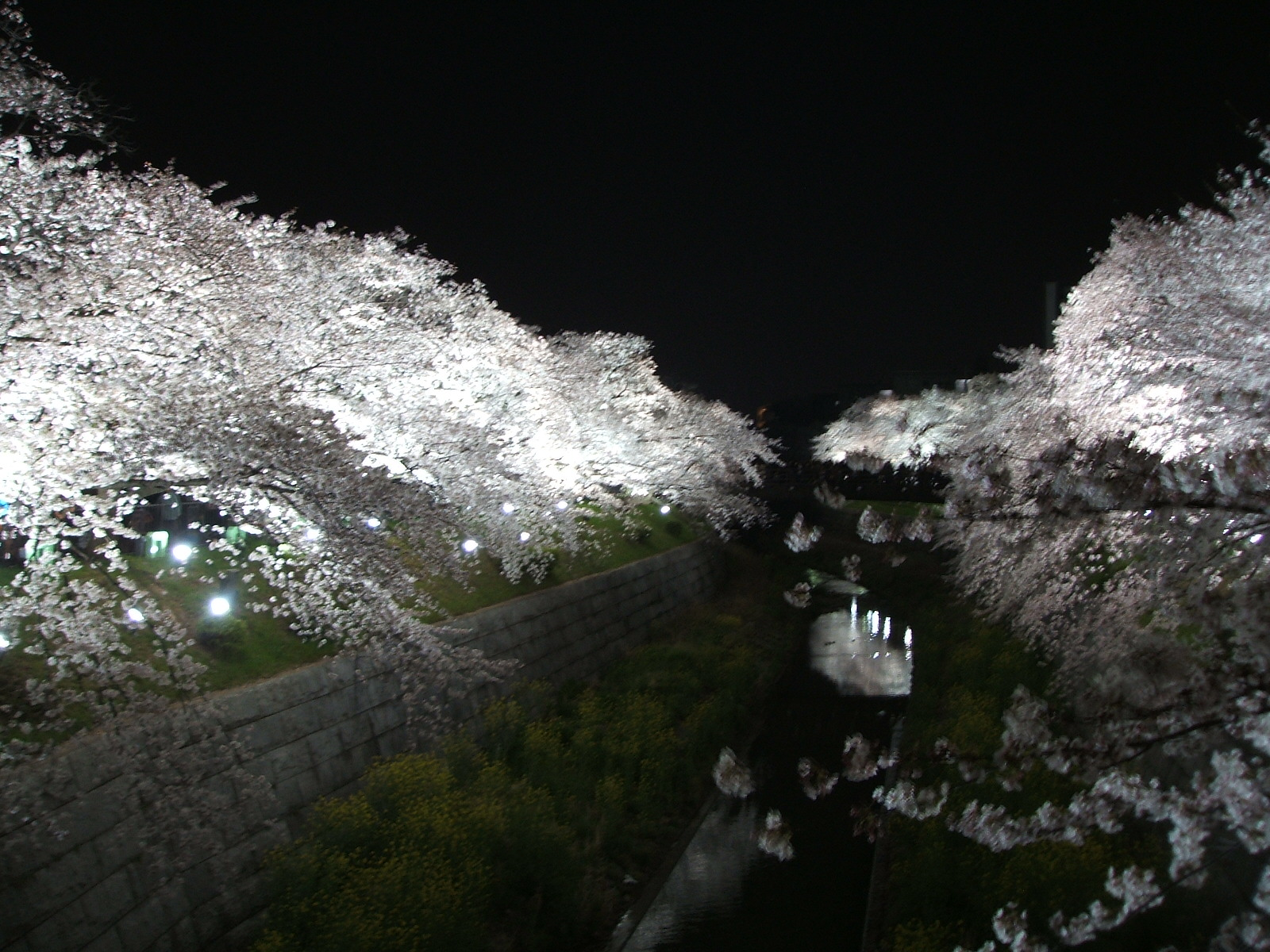 YamazakiRiver in April